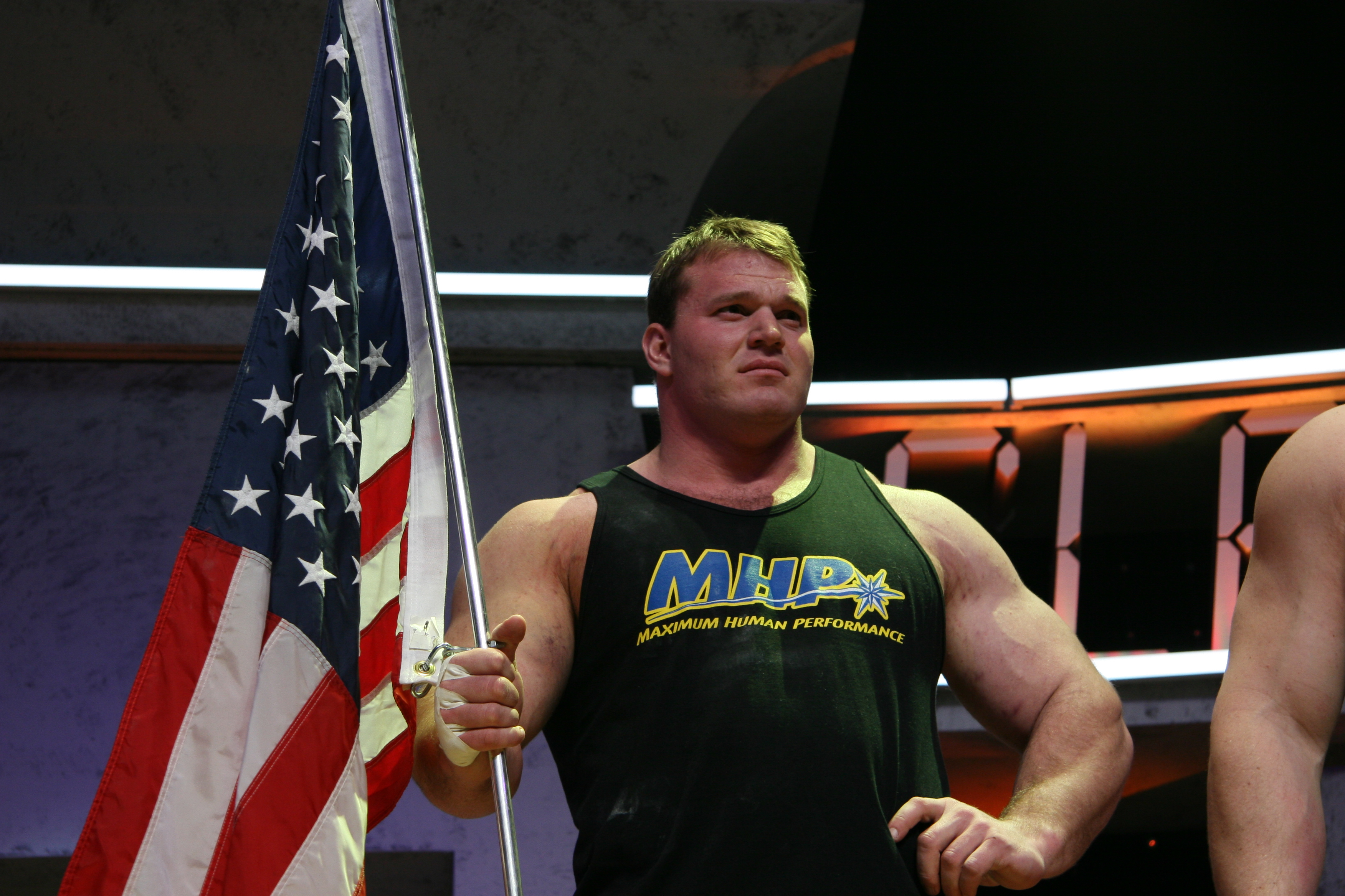 Derek Poundstone, najsilniejszy policjant świata w 2008 r.